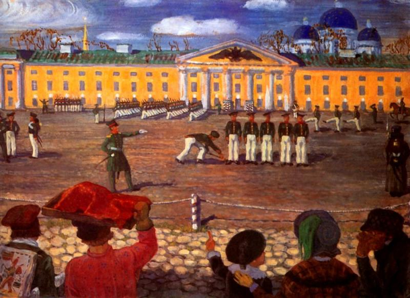 № 46: М.В. Добужинский. Учение солдат в николаевское время .- 1913 .- 17 с. .